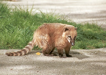 Nasenbär